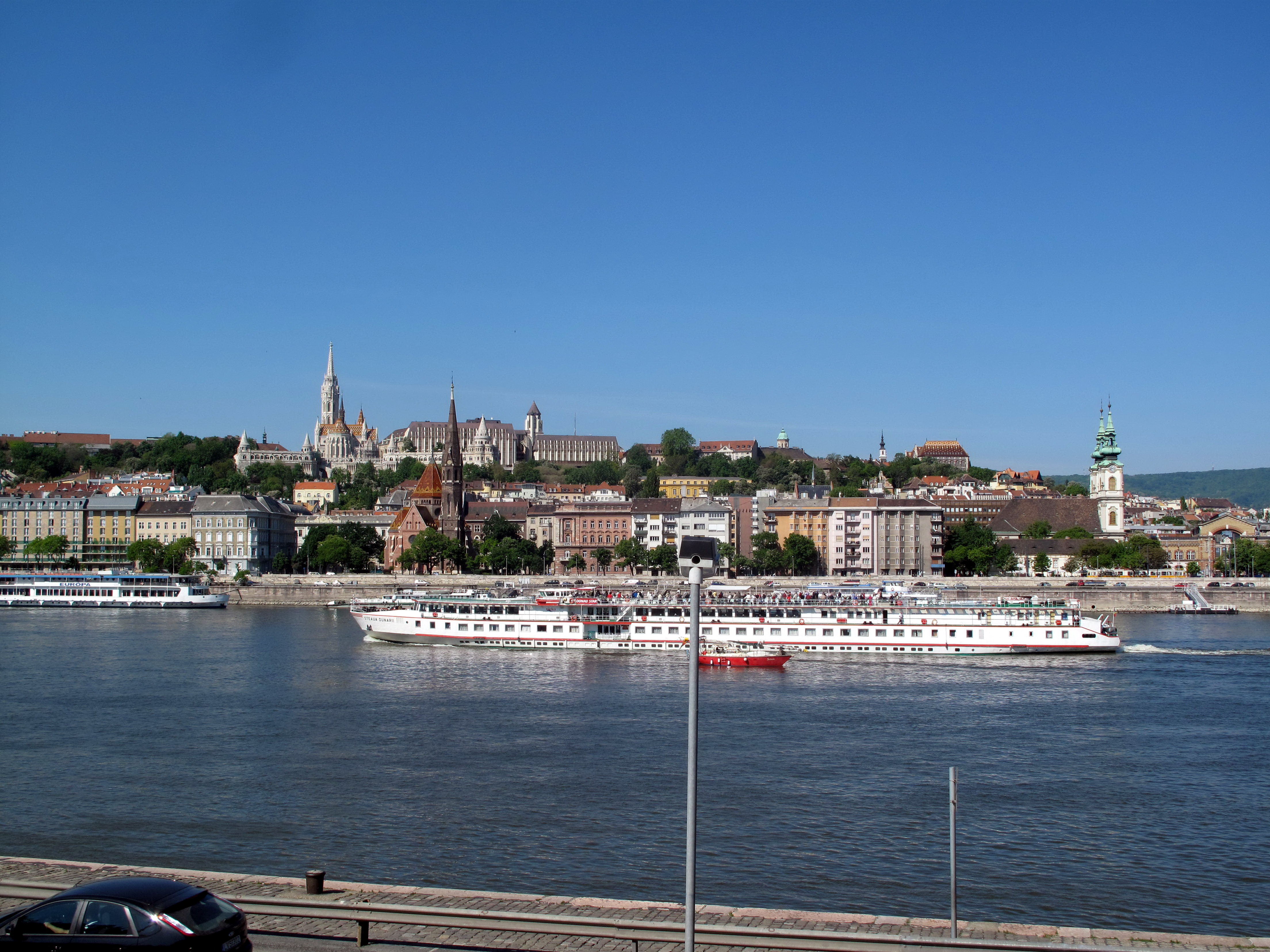 Budapešť